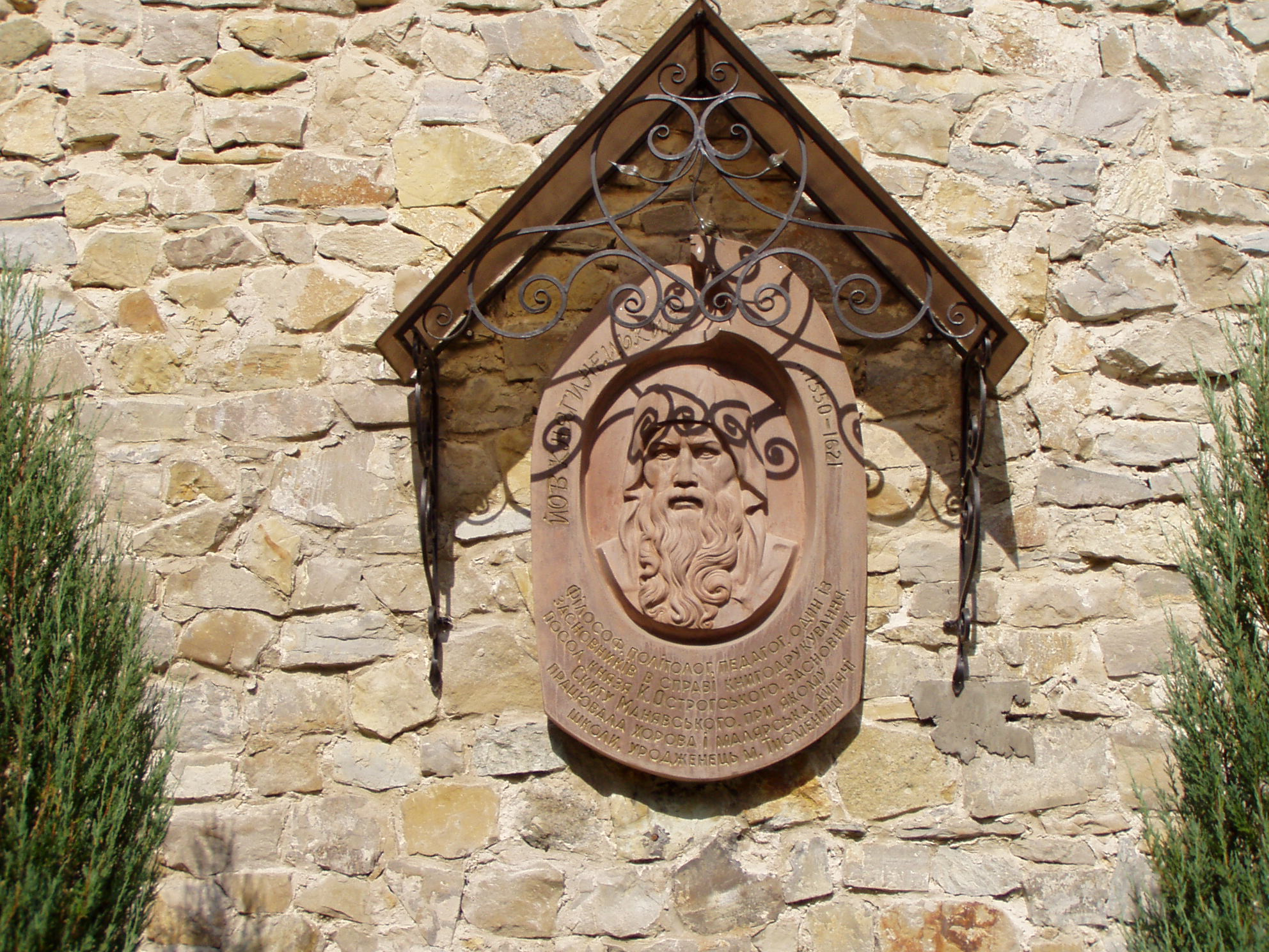 Tablica pamiątkowa poświęcona założycielowi skitu.